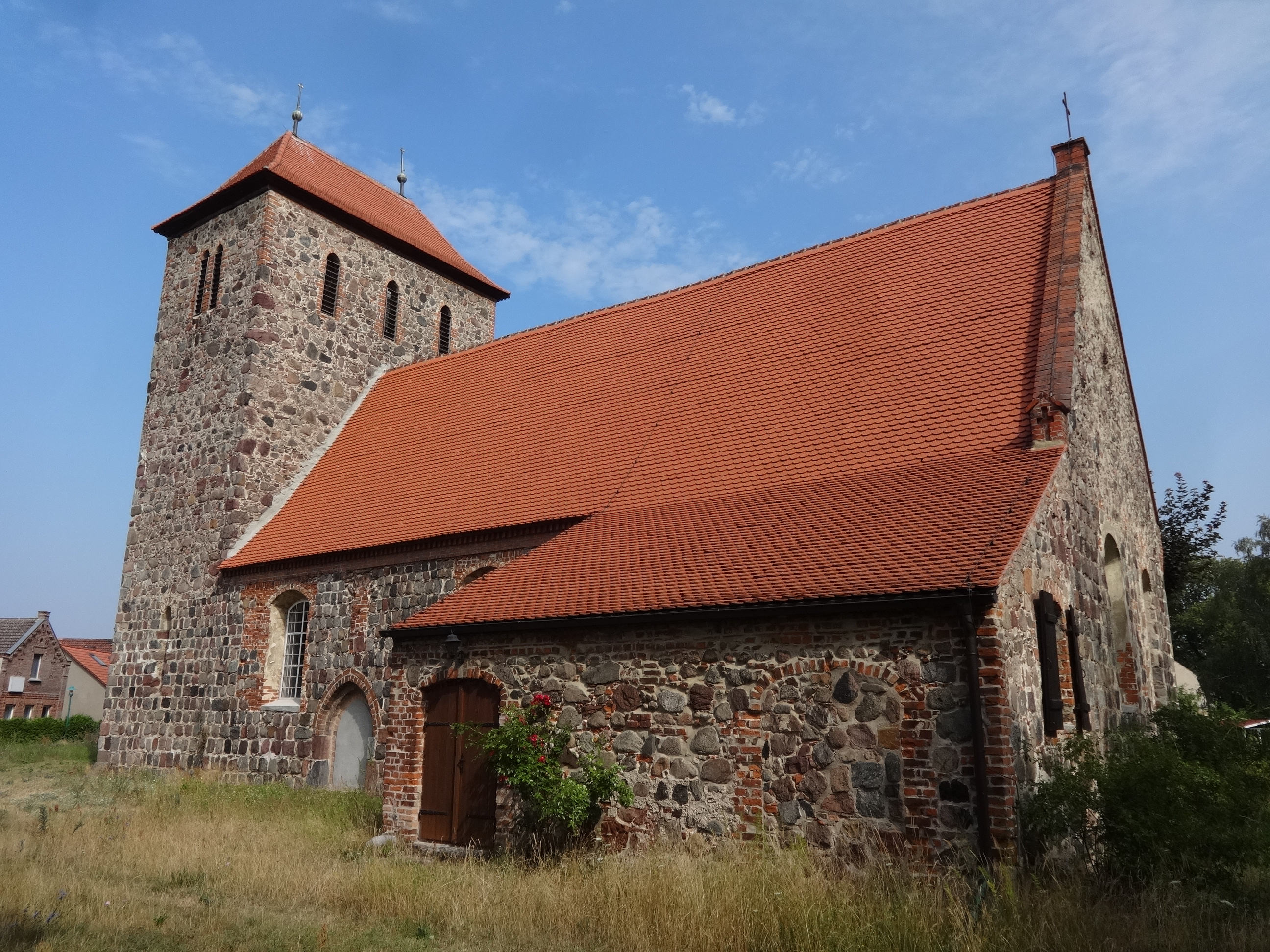 Die Dorfkirche in Dahlewitz ist eine Feldsteinkirche aus dem 13. Jahrhundert, die im 17. Jahrhundert barock überformt wurde. Im Innern befindet sich eine Ausstattung, die im Wesentlichen aus dem Jahr 1861 stammt.